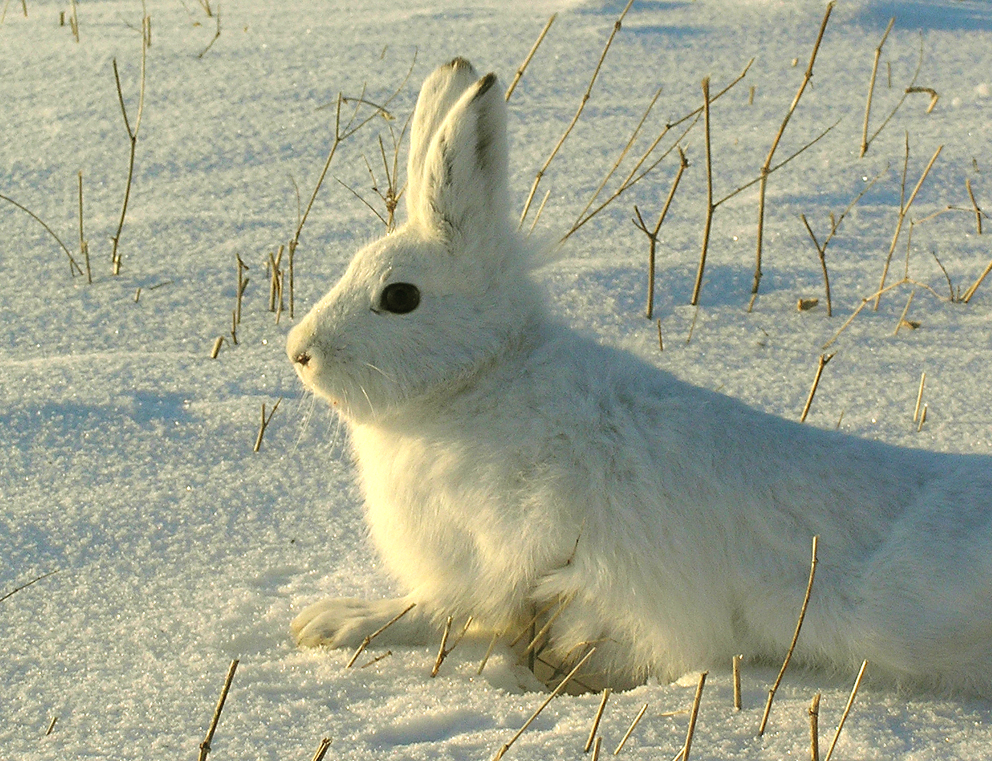 Заяц-беляк в Волгоградской области